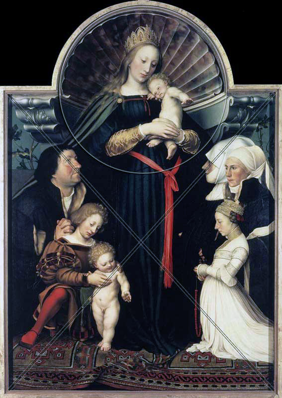 Darmstädter Madonna, Hans Holbein d. J., Lines added